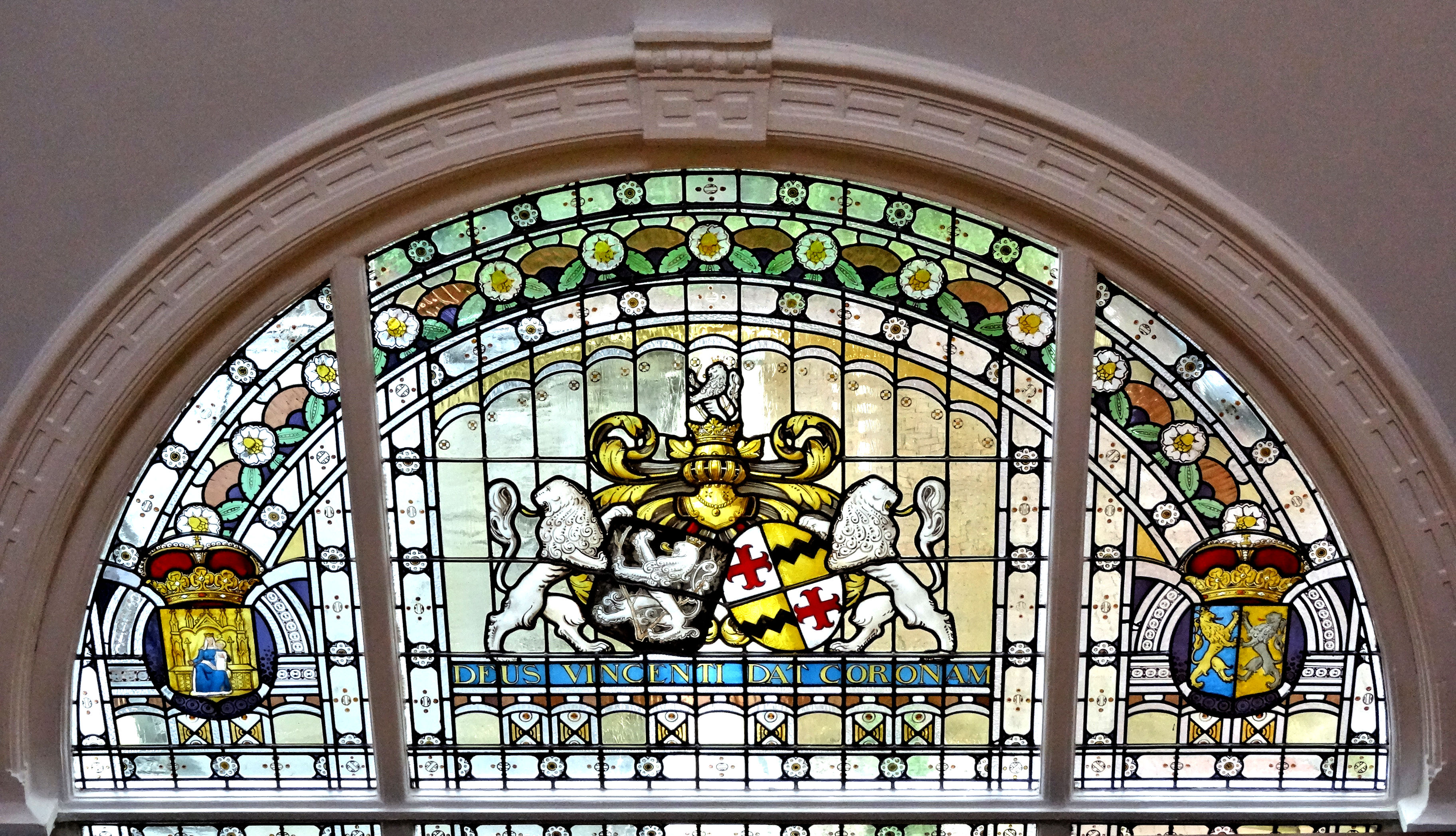 Detail glas-in-loodraam met de wapens van het echtpaar jhr. mr. Hendrik Gerard van Holthe tot Echten (1862-1940) en Constantia Johanna Anna Christina barones van der Feltz (1870-1953). Het raam werd 1906-1907 geplaatst in Huize Ebbenerve in Assen en was gemaakt in het atelier van J.W. Gips.